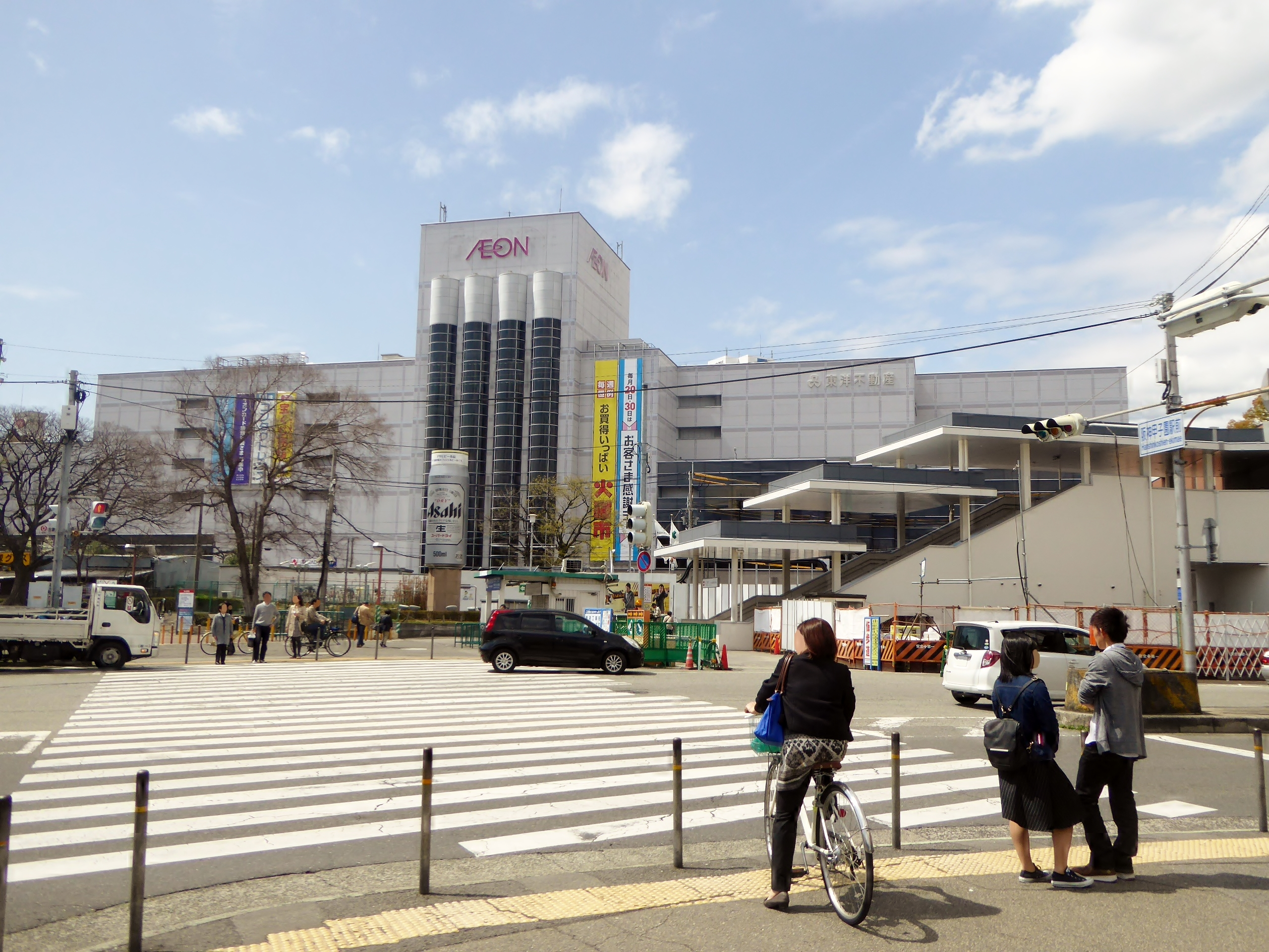 イオン甲子園店を撮影。